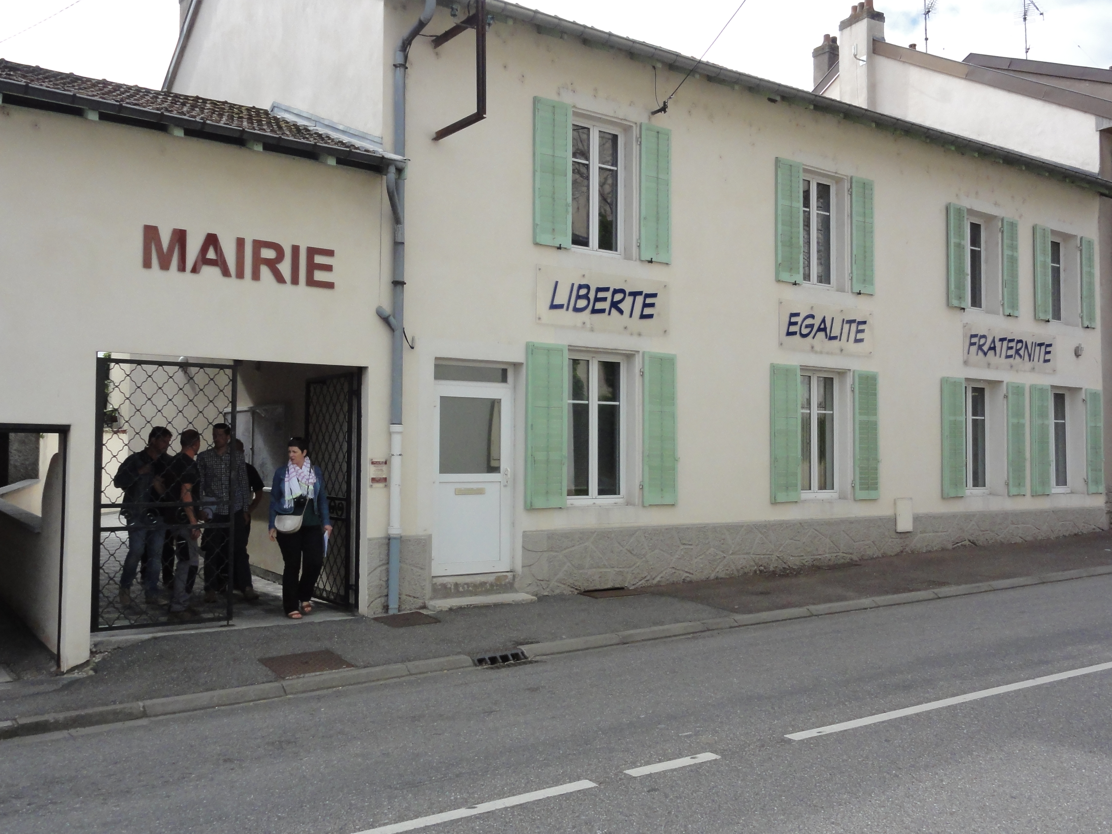 Damelevières (M-et-M) mairie